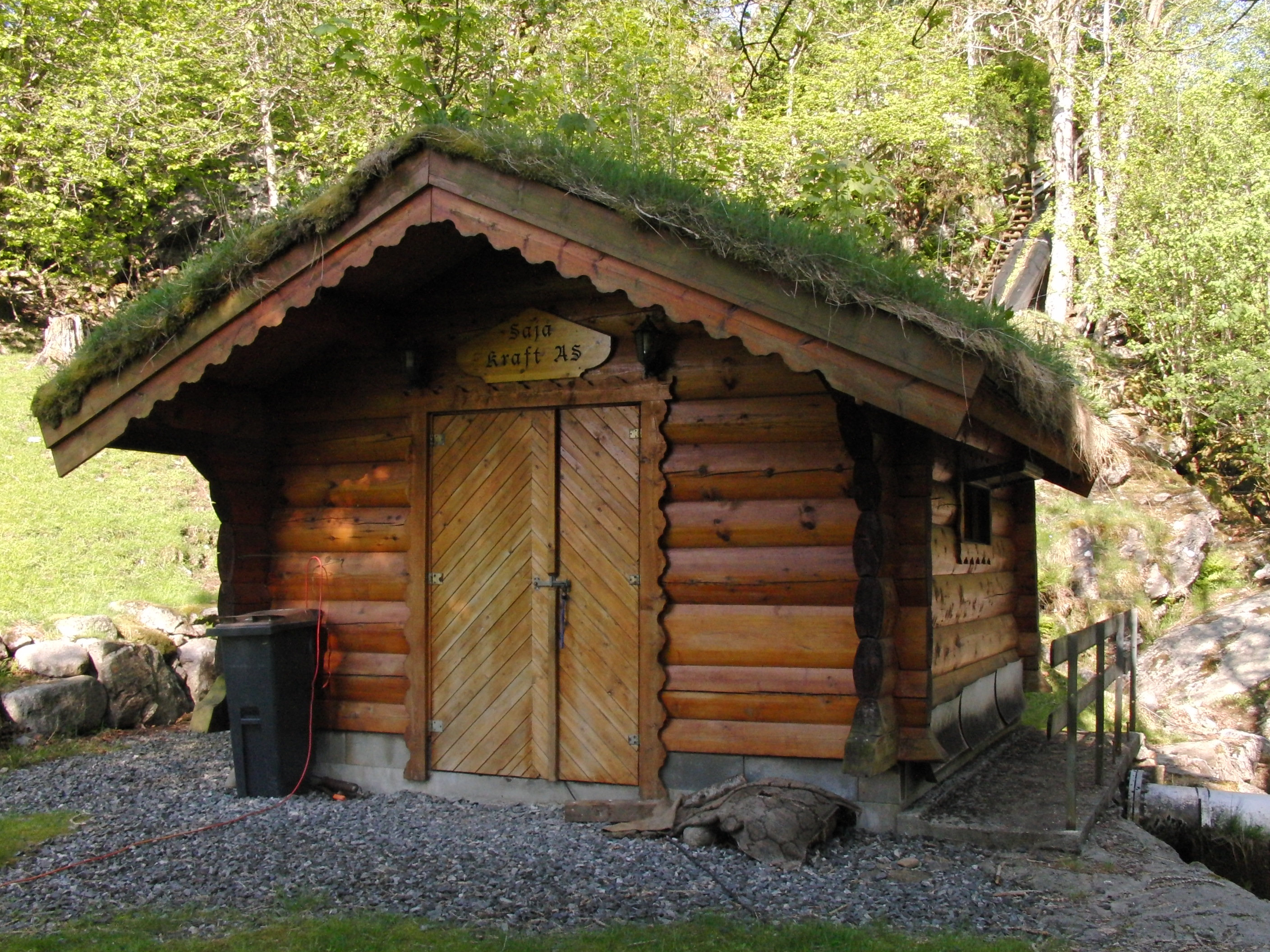 Sajå kraftverk